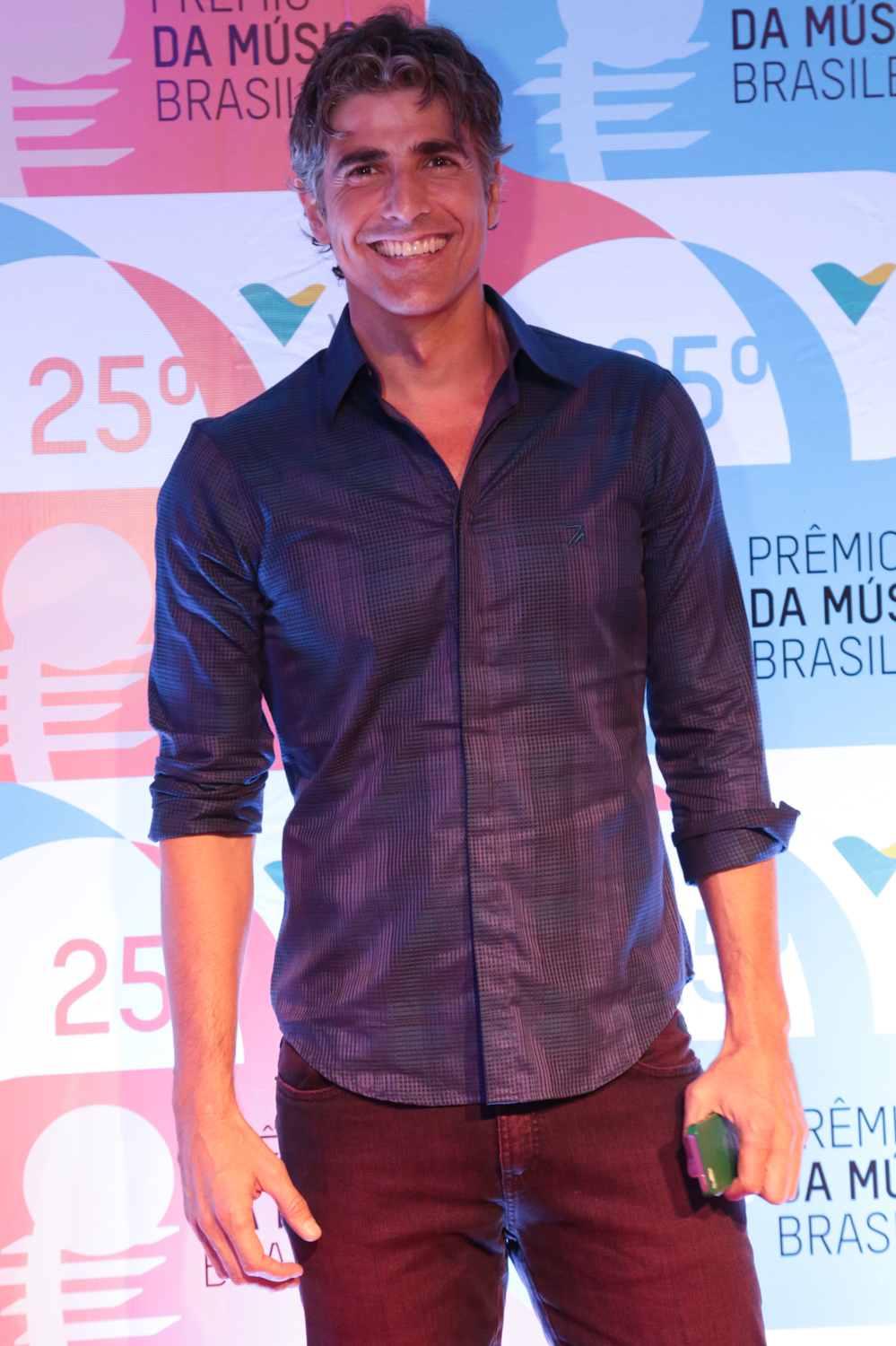 Reynaldo Gianecchini durante o 25º Prêmio da Música Brasileira no Theatro Municipal